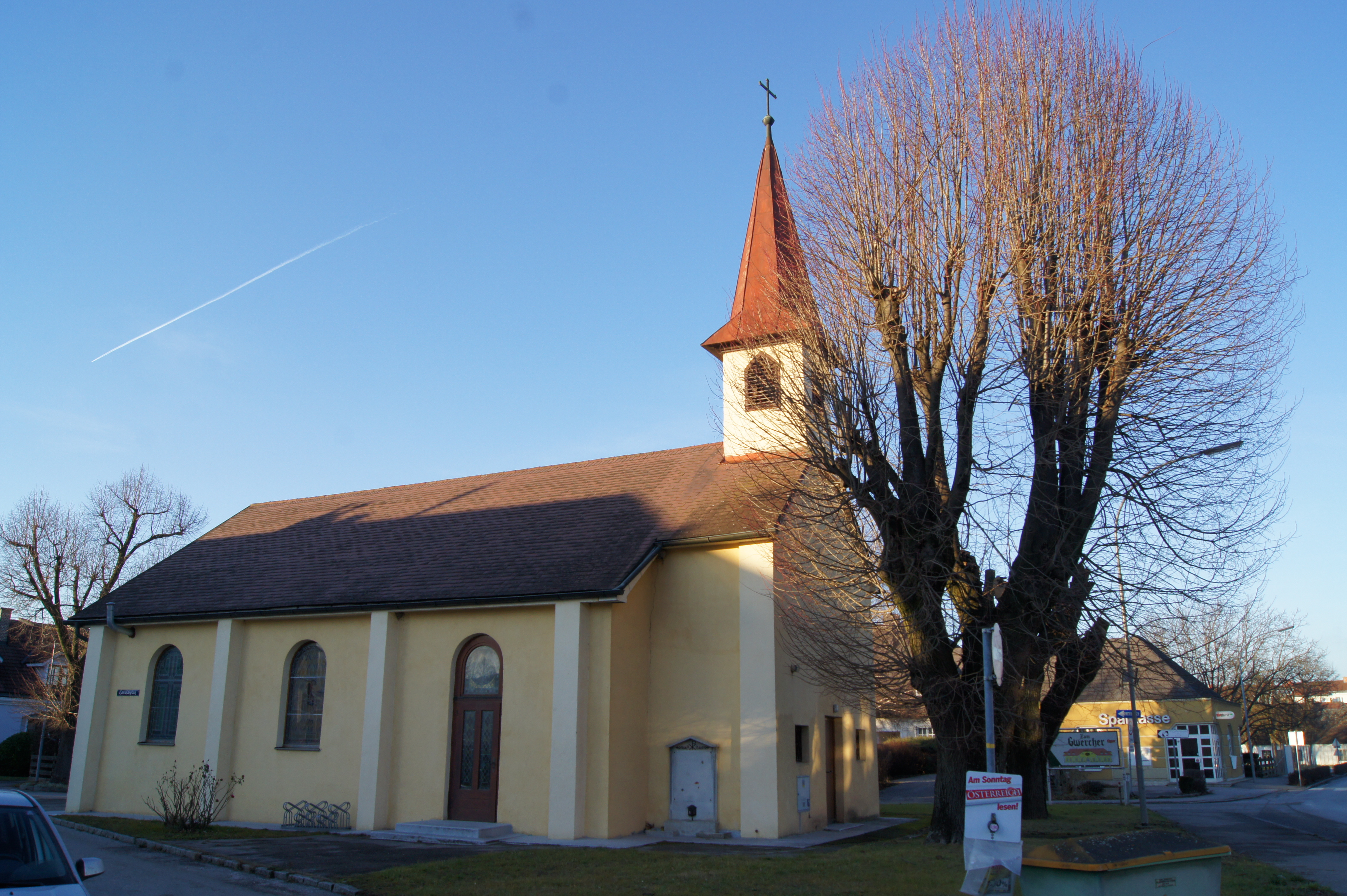 Die Serbisch-orthodoxe Pfarrkirche St. Pölten im Stadtteil Stattersdorf. Die vor dem Kirchengebäude stehenden zwei holländischen Linden stehen unter Naturschutz. This media shows the natural monument in Lower Austria with the ID P-030.